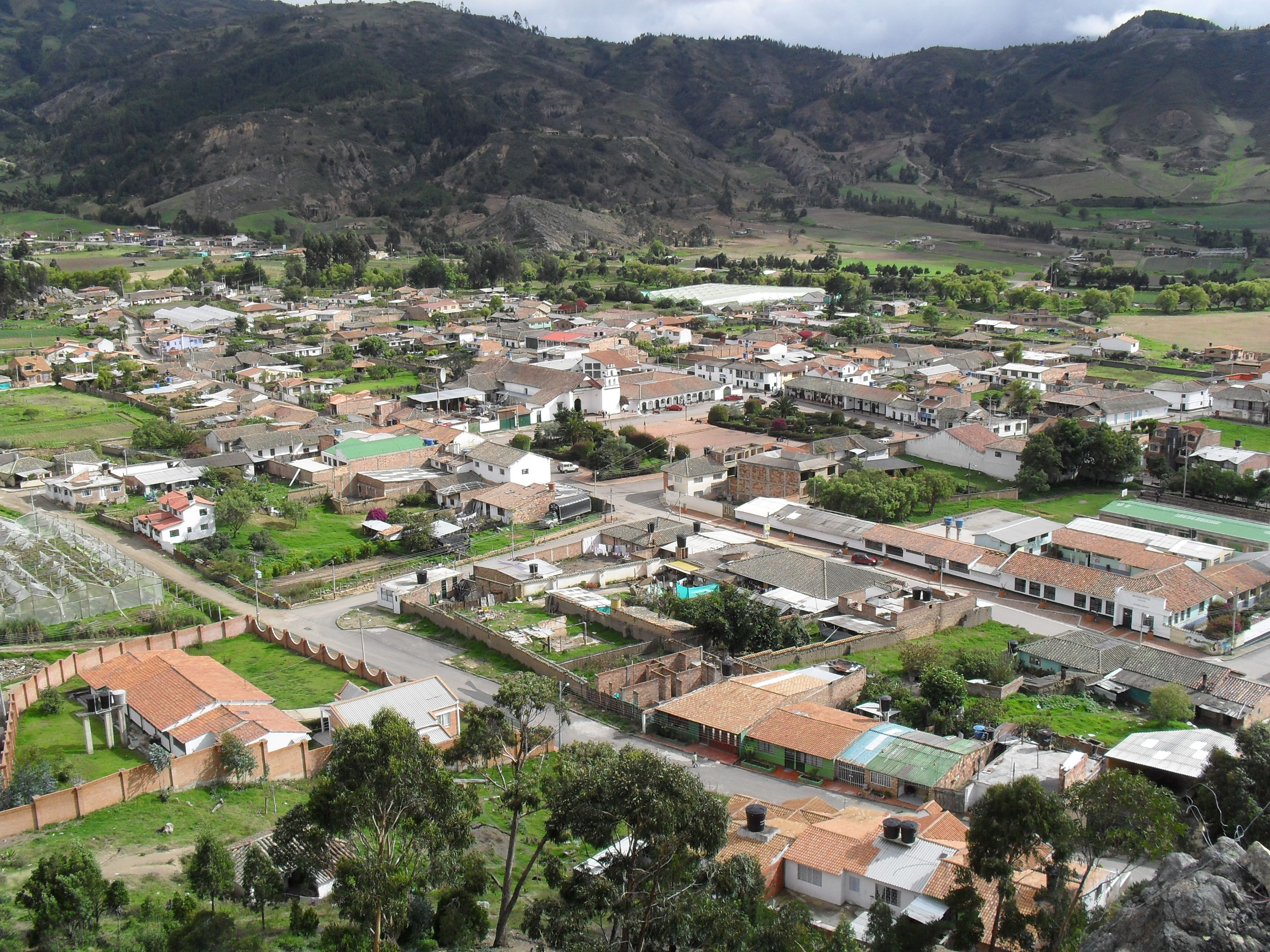 Foto panorámica del área urbana de Cucaita, Boyacá, Colombia